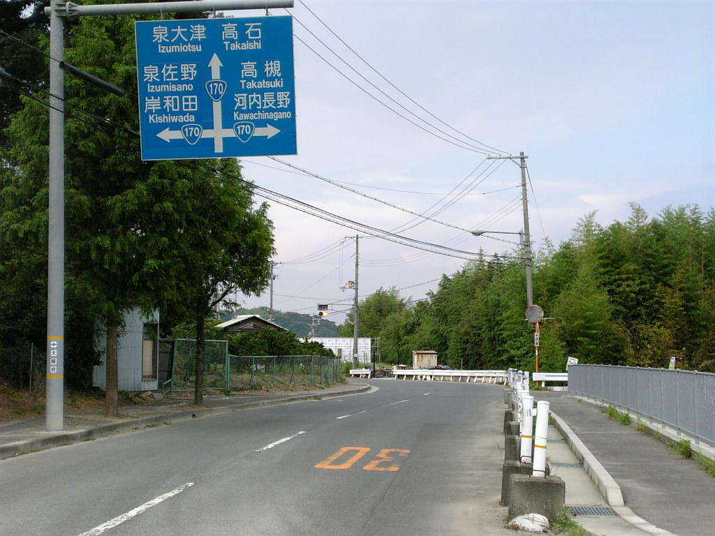 行き先表示方向すべてが国道170号線（和泉市の槙尾中南交差点の旧国道南側にて）